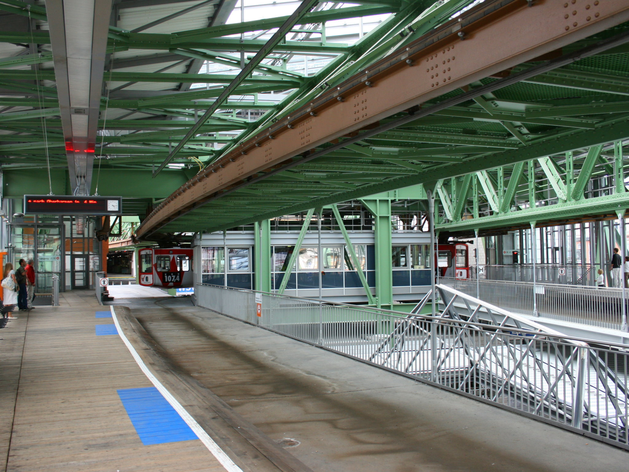 Schwebebahnstation Vohwinkel